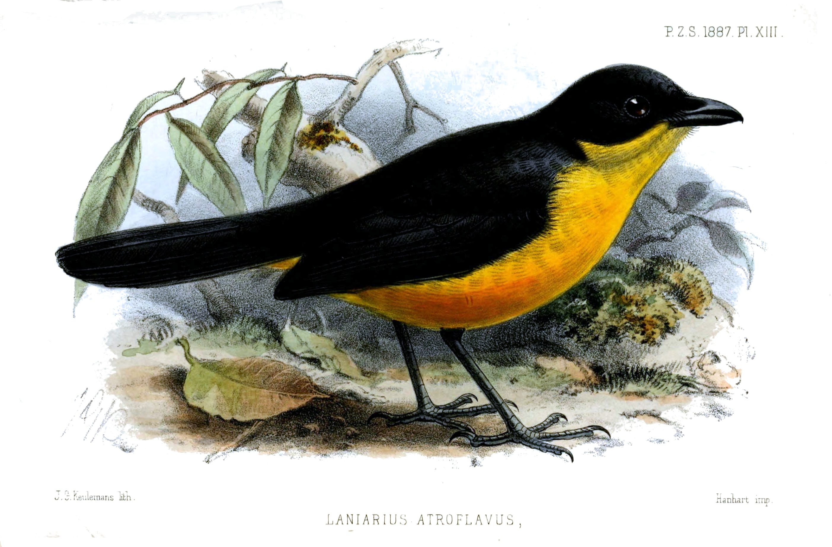 Laniarius atroflavus